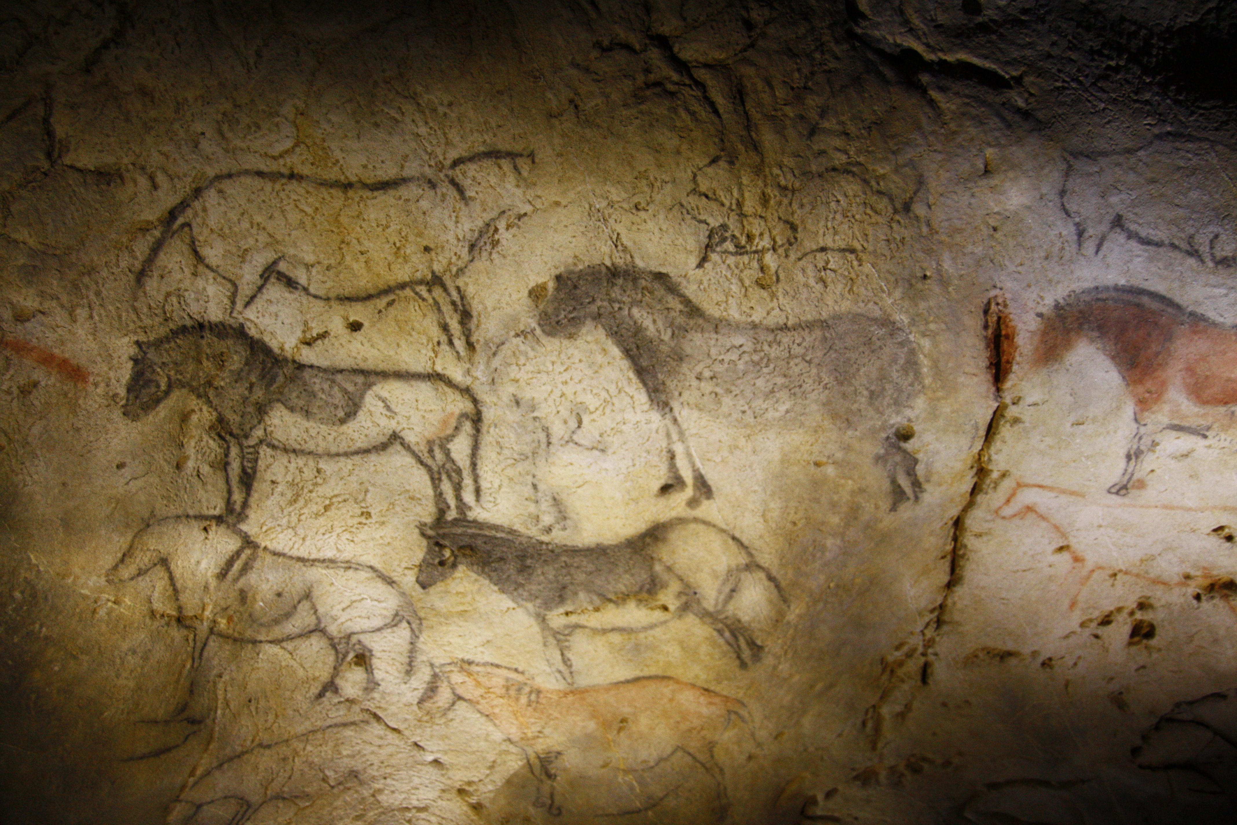 Ekainberriko zaldien irudiak.